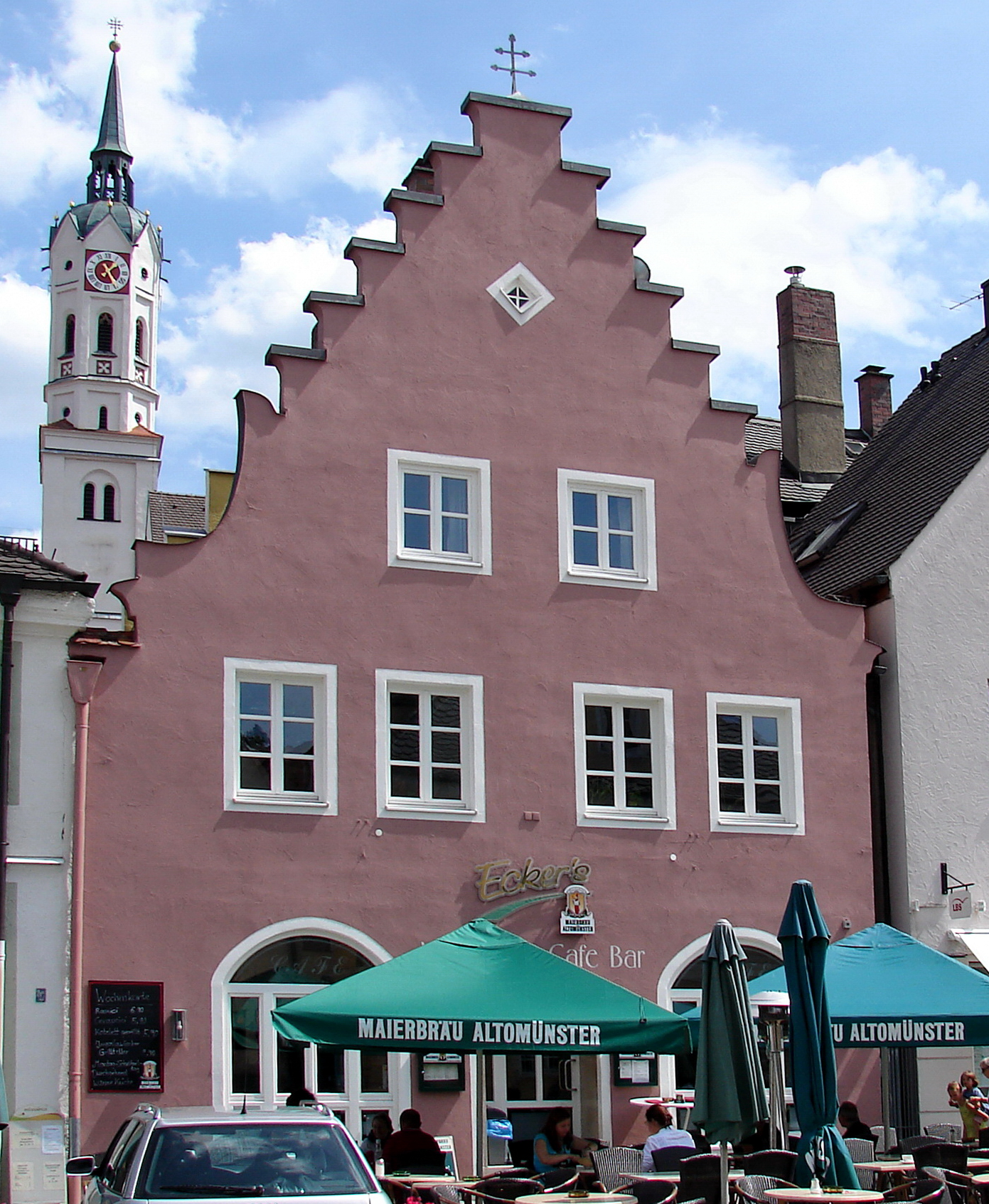 Wohn- und Cafehaus, dreigeschossiger Satteldachbau mit getrepptem Quergiebel, Ende 19. Jahrhundert, Umbau 1925.